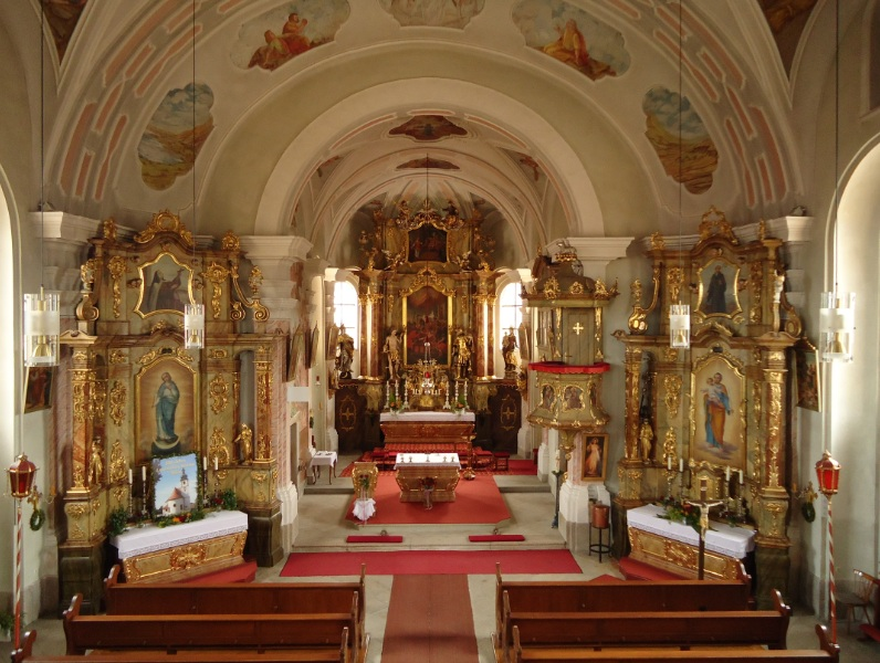 Expositurkirche St. Laurentius in Plößberg-Stein - Innenraum